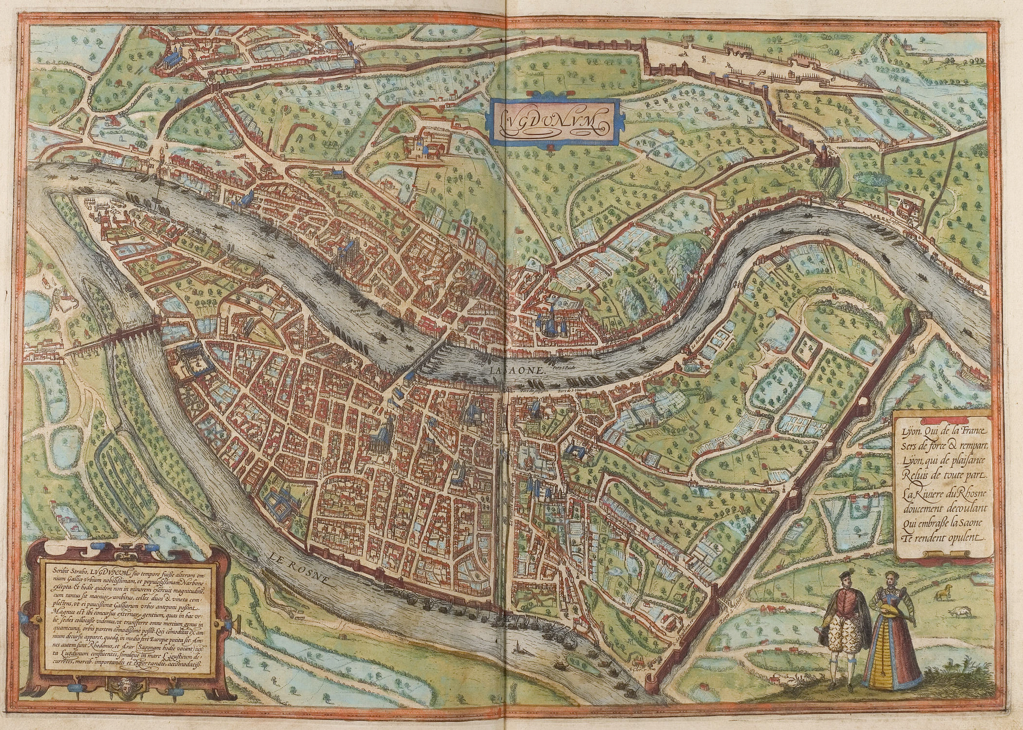 Lyon